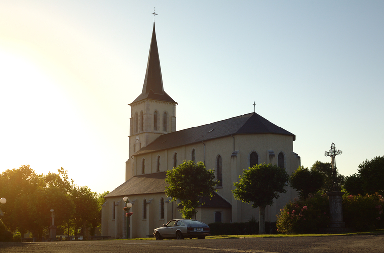 Eglise de Saint-Vincent